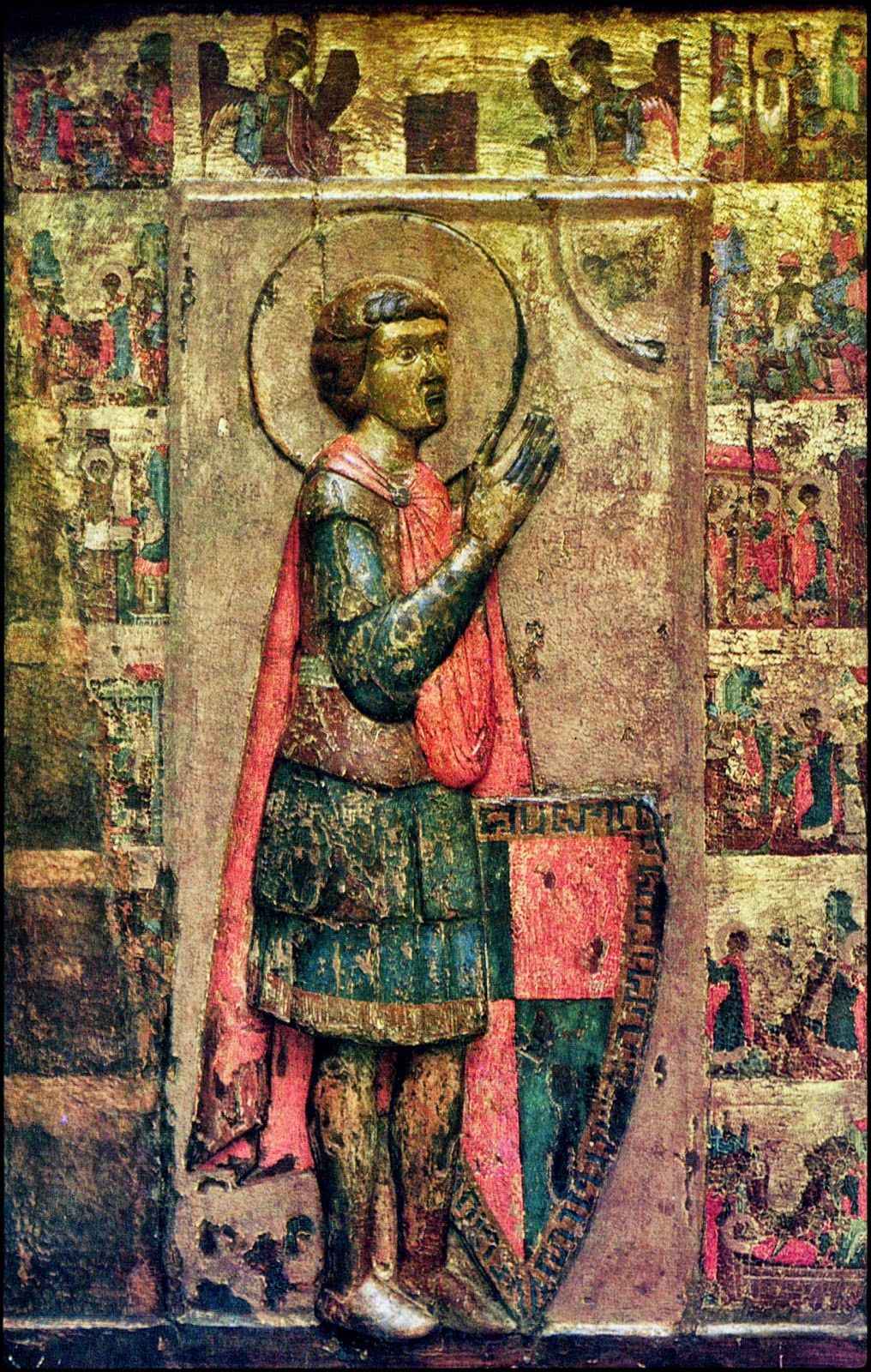 Ανάγλυφη εικόνα Αγίου Γεώργιου από την Καστοριά. Βυζαντινό Μουσείο Αθηνών. Τέλη 13ου αιώνα